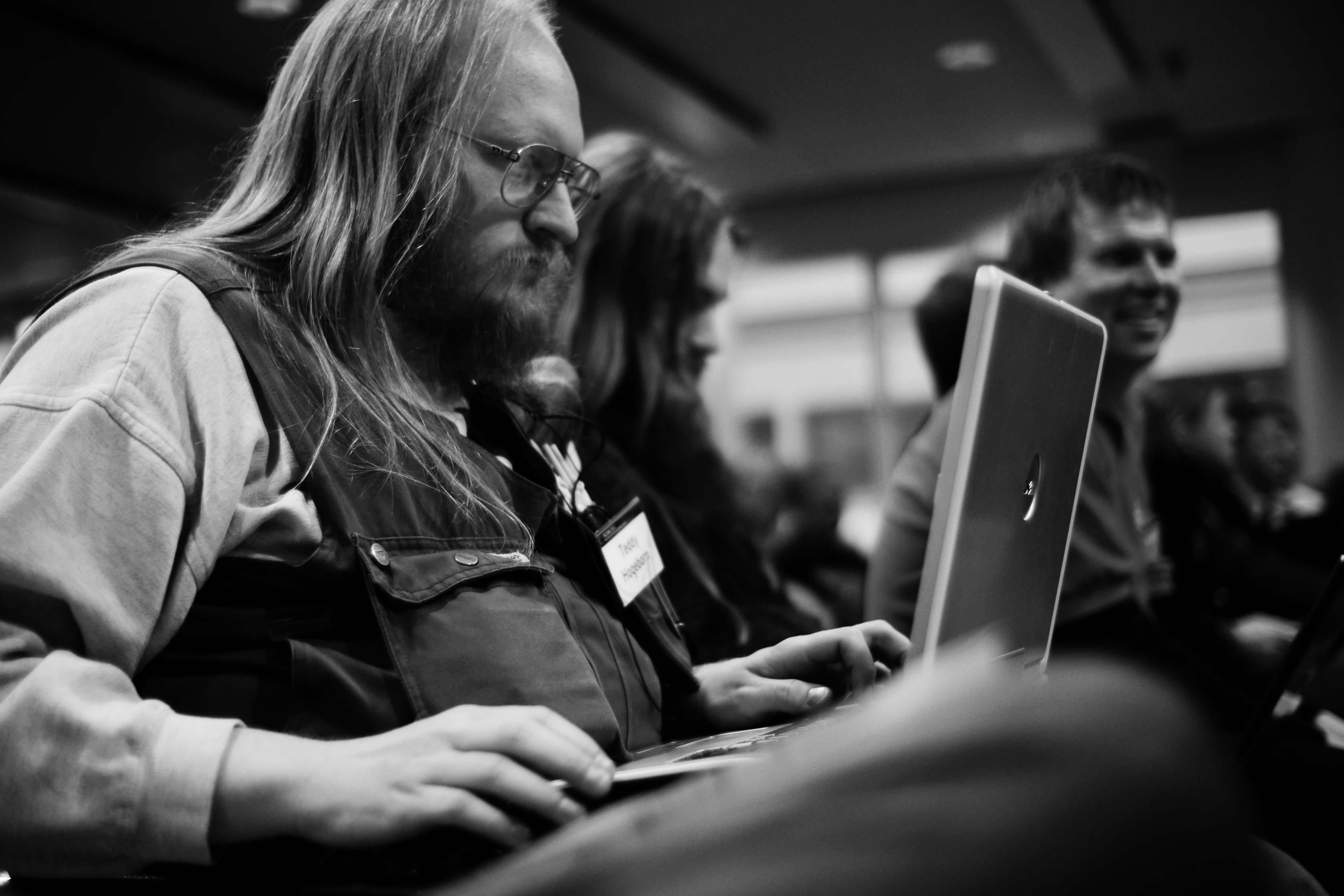 Hackers at FSCONS 2011